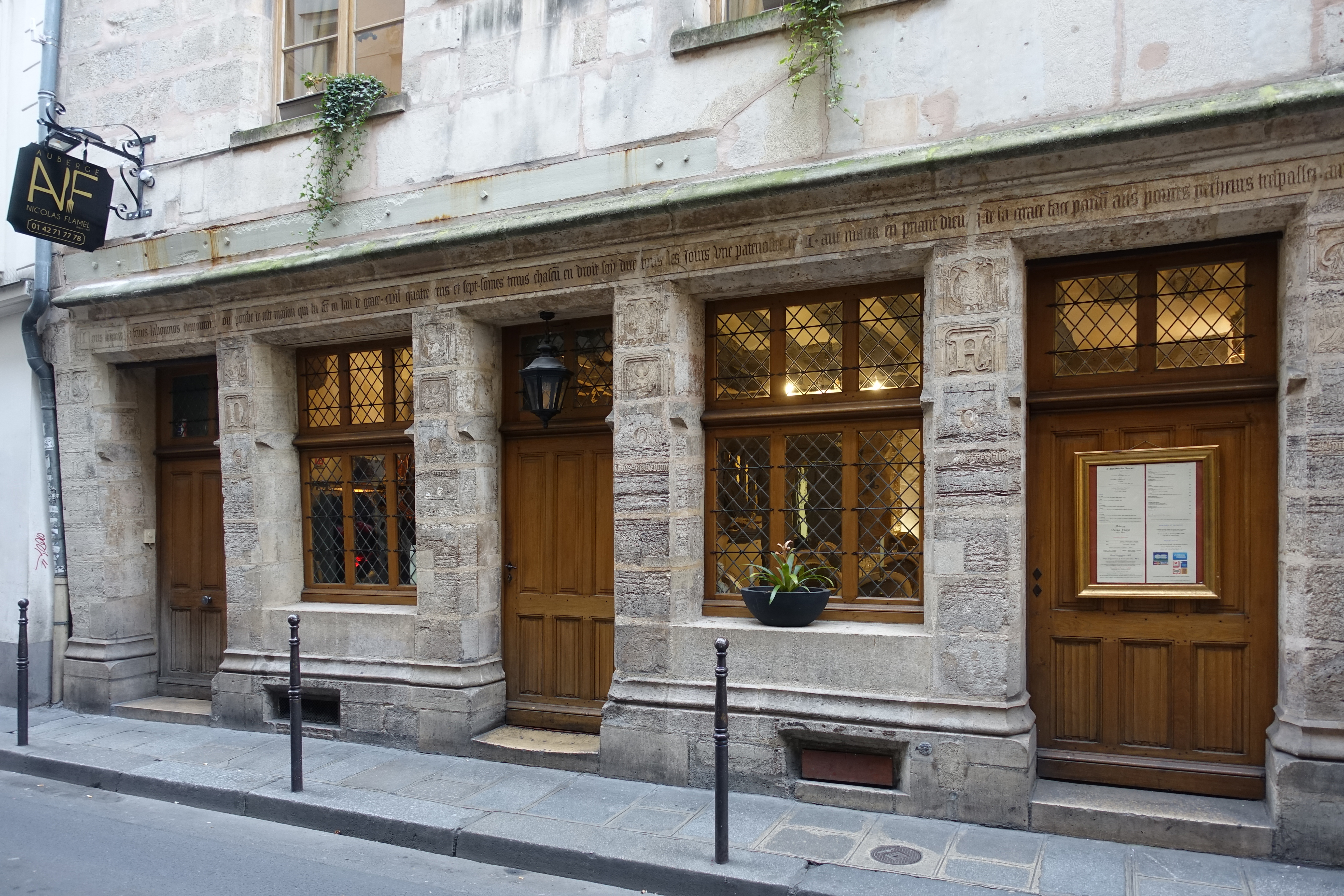 Auberge de Nicolas Flamel @ Paris